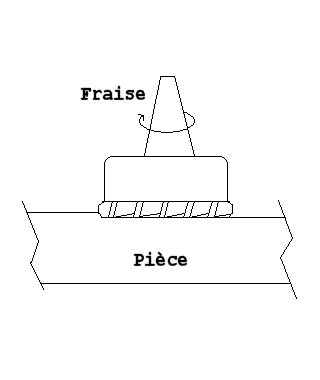 dessin personnel d'une fraise à surfacer.